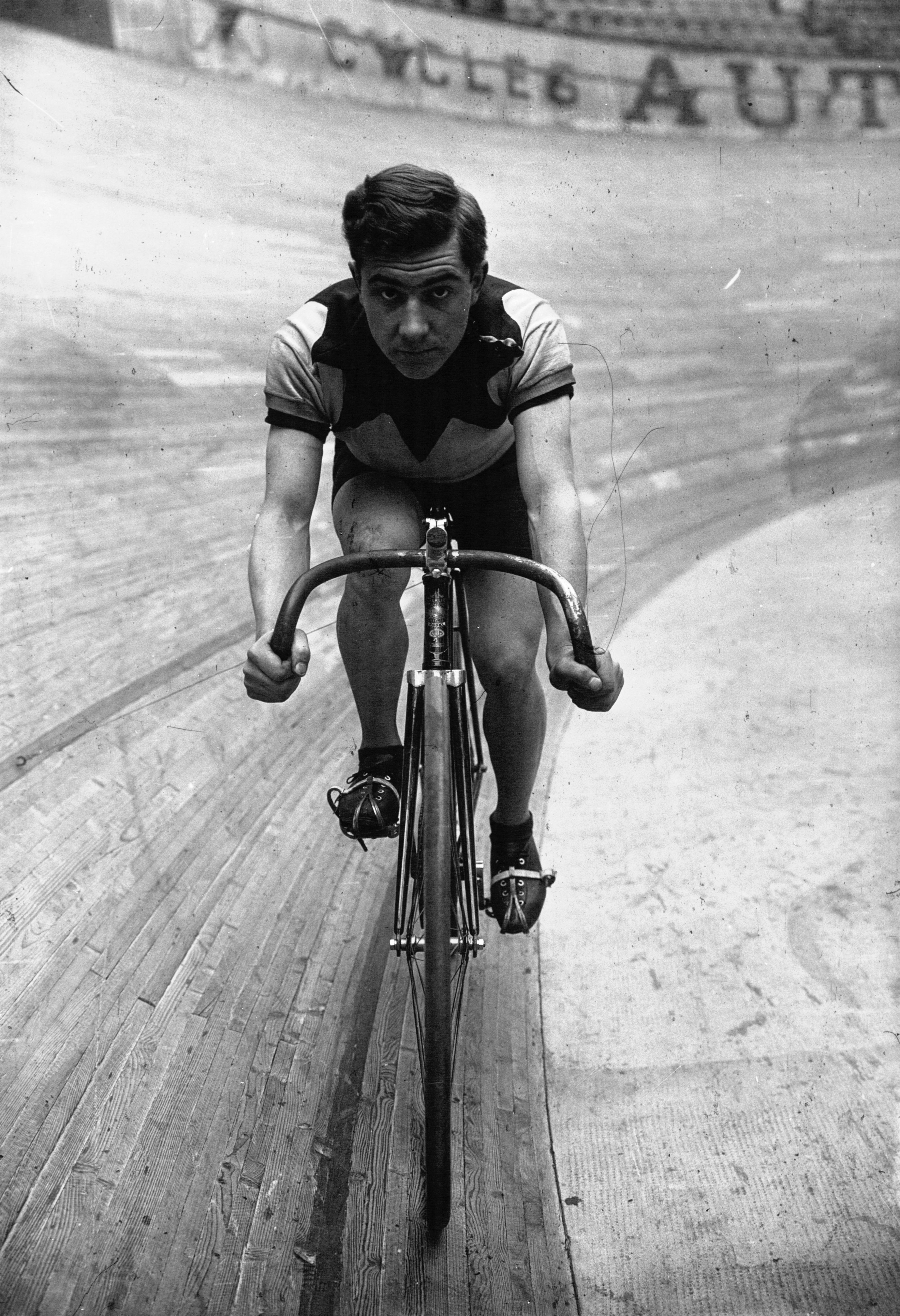 Letourneur, cycliste, à vélo. photographie de presse/ Agence Meurisse